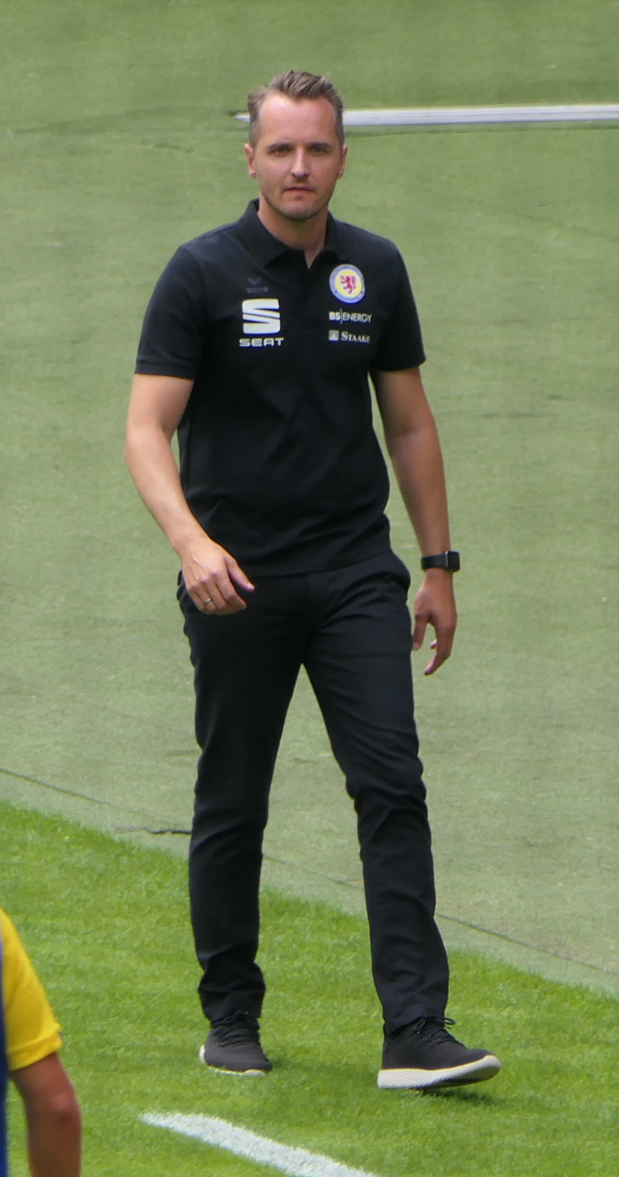 Der Fussballtrainer von Eintracht Braunschweig, Christian Flüthmann, beim Auswärtsspiel gegen den 1.FC Kaiserslautern am 18.08.2019.